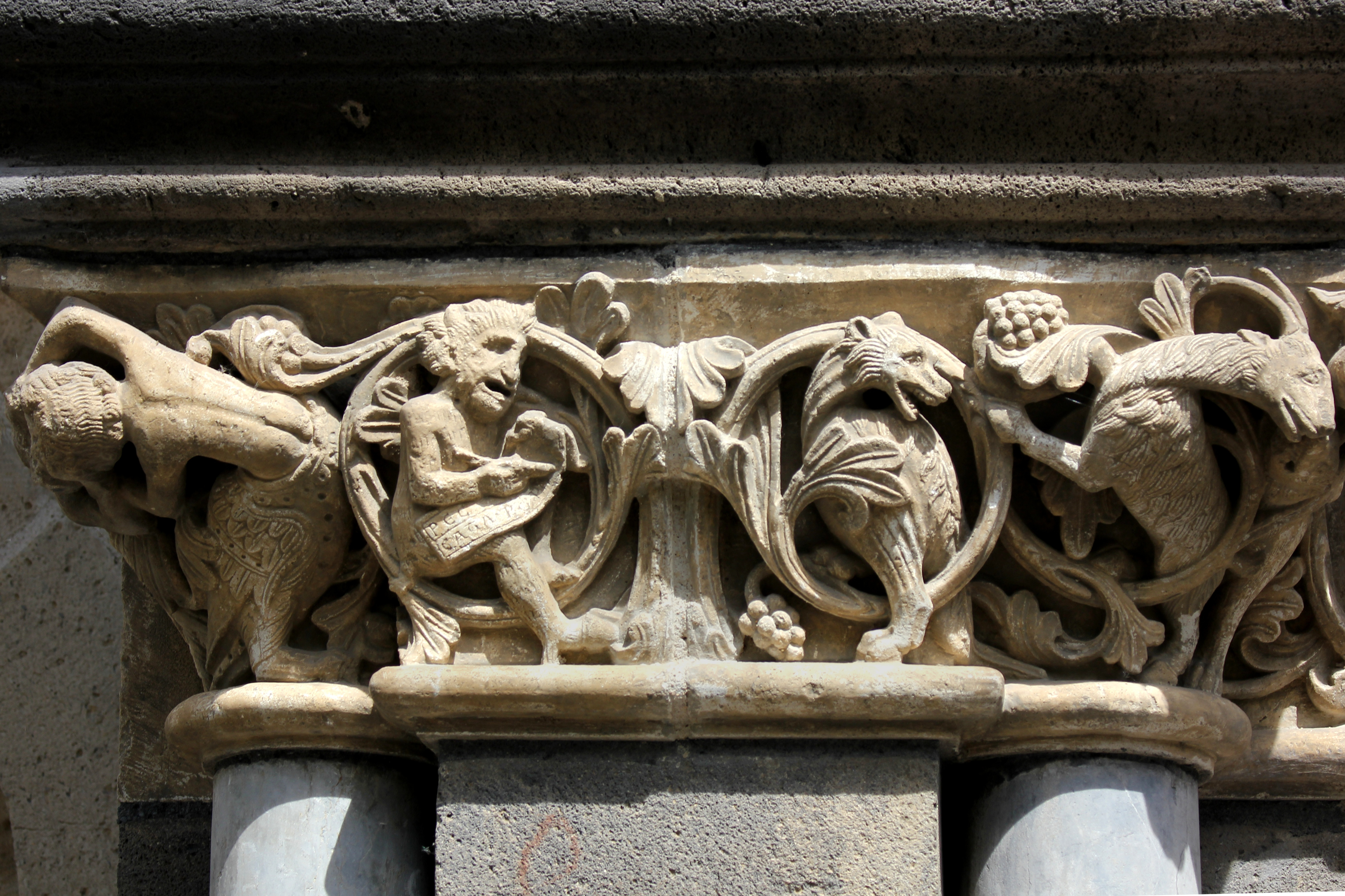 Maria Laach – Detail aus dem Fries am Eingang zum Vorhof, dem sogenannten Paradies: Teufelchen, das die „Peccata populi“, die Sünden des Volkes, aufschreibt, das heißt auch derjenigen, die in die Kirche eintreten